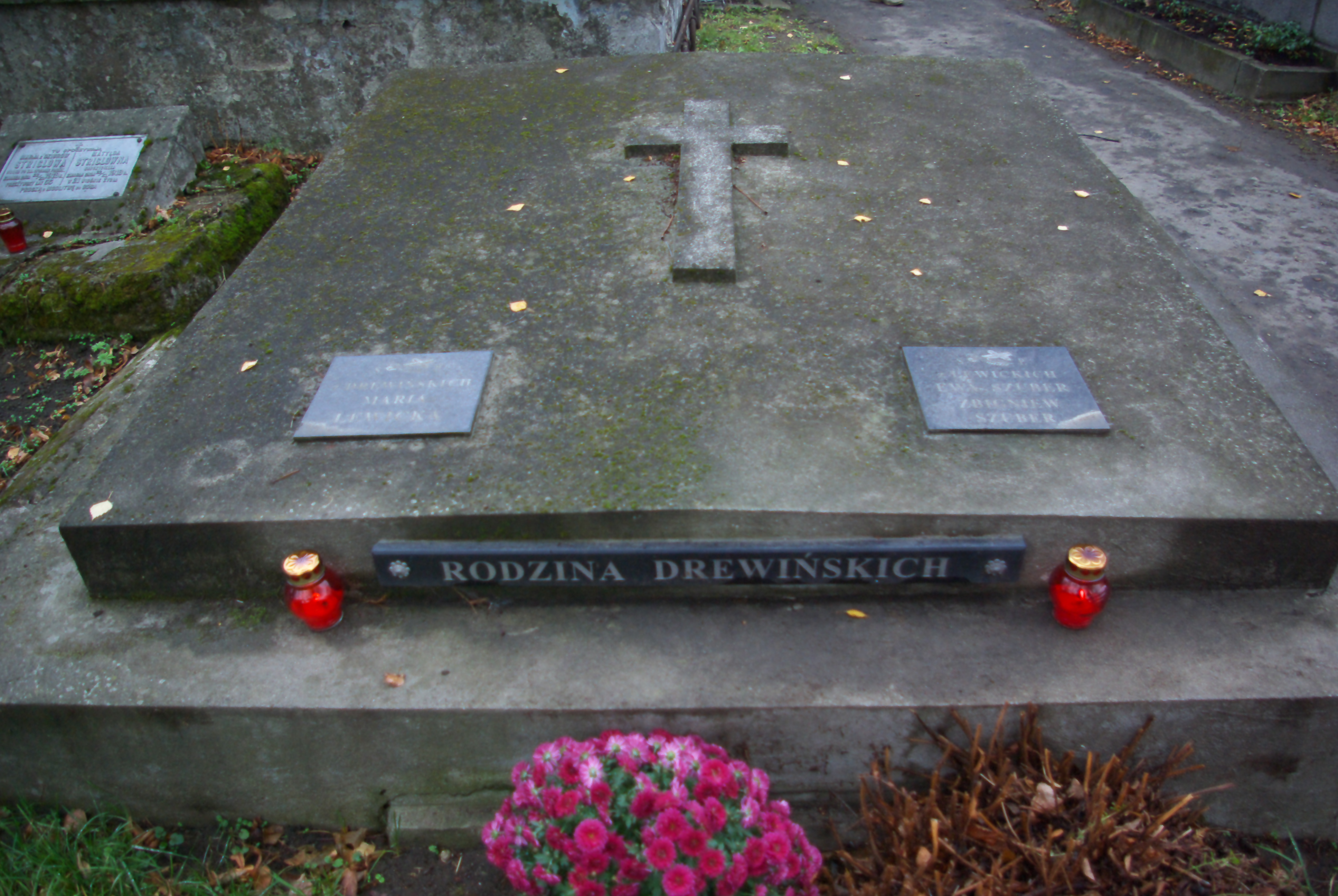 Grobowiec rodziny Drewińskich i Szuberów i Lewickich na Cmentarzu Centralnym w Sanoku